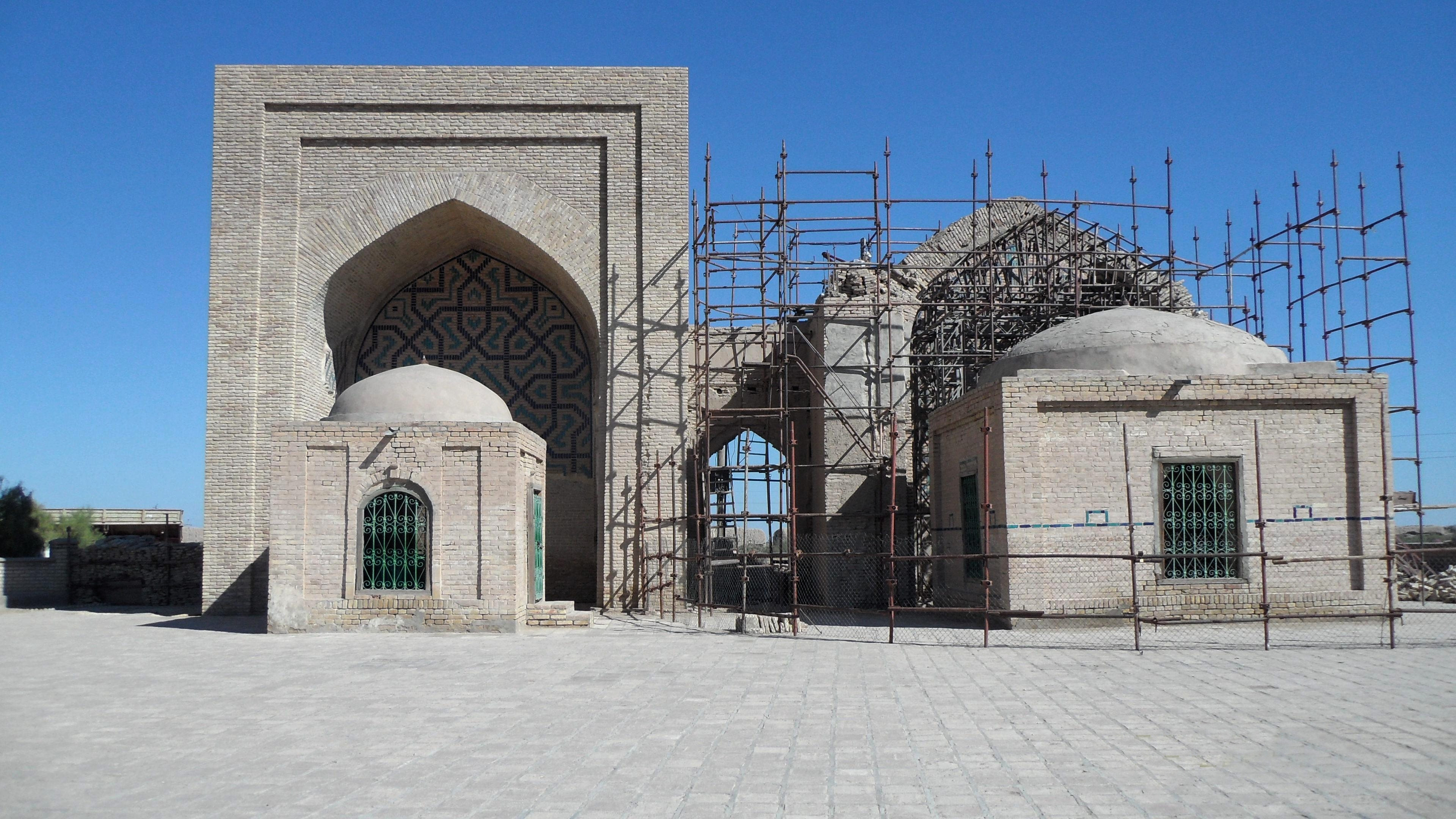 MervTurkmenistan Moschee